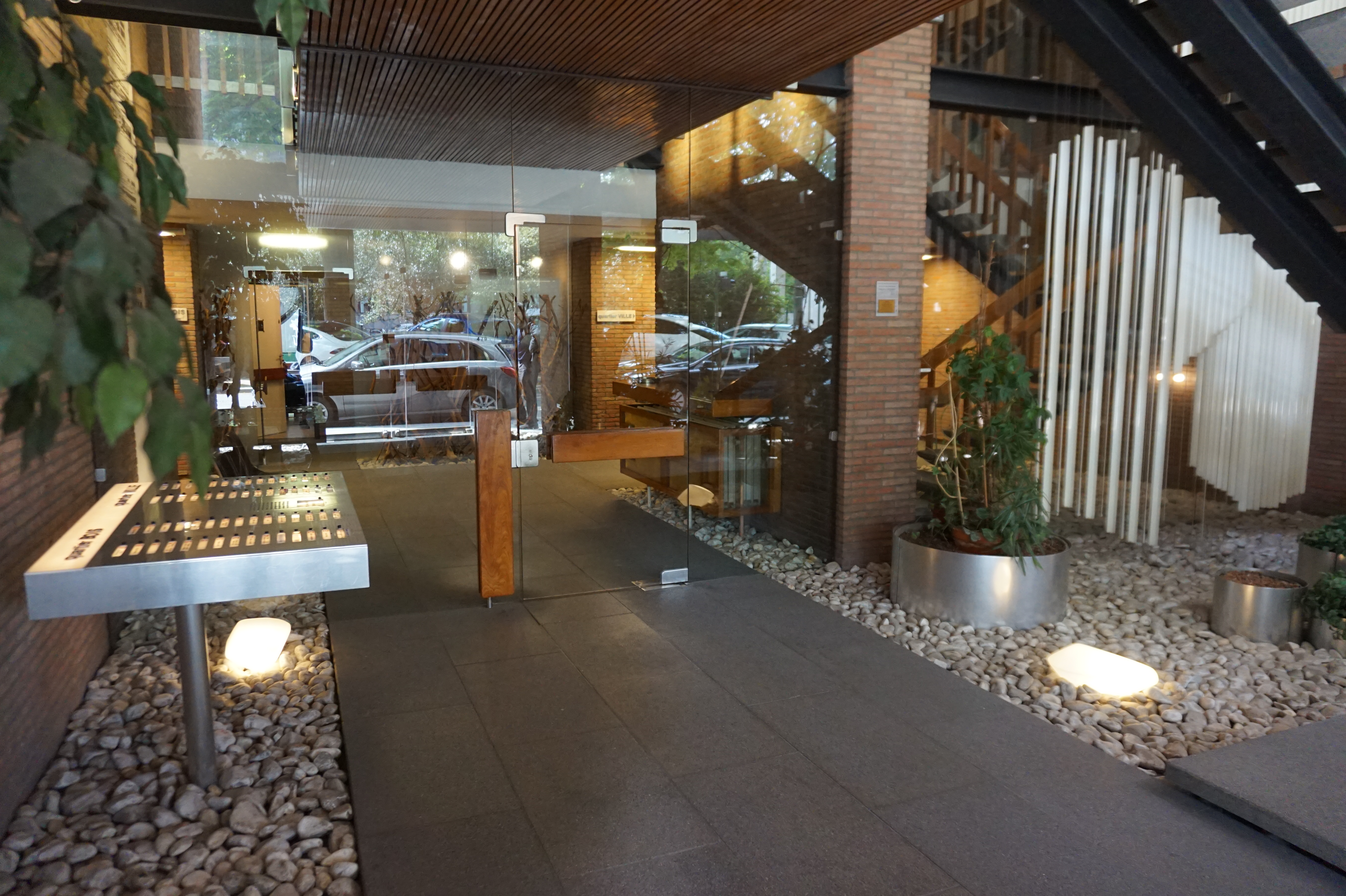 Photographie couleur du hall d'entrée depuis l'avenue Louise : parlophone en aluminium brossé sur la gauche, dalle béton et escaliers béton avec garde-corps bois, installations de plantes.